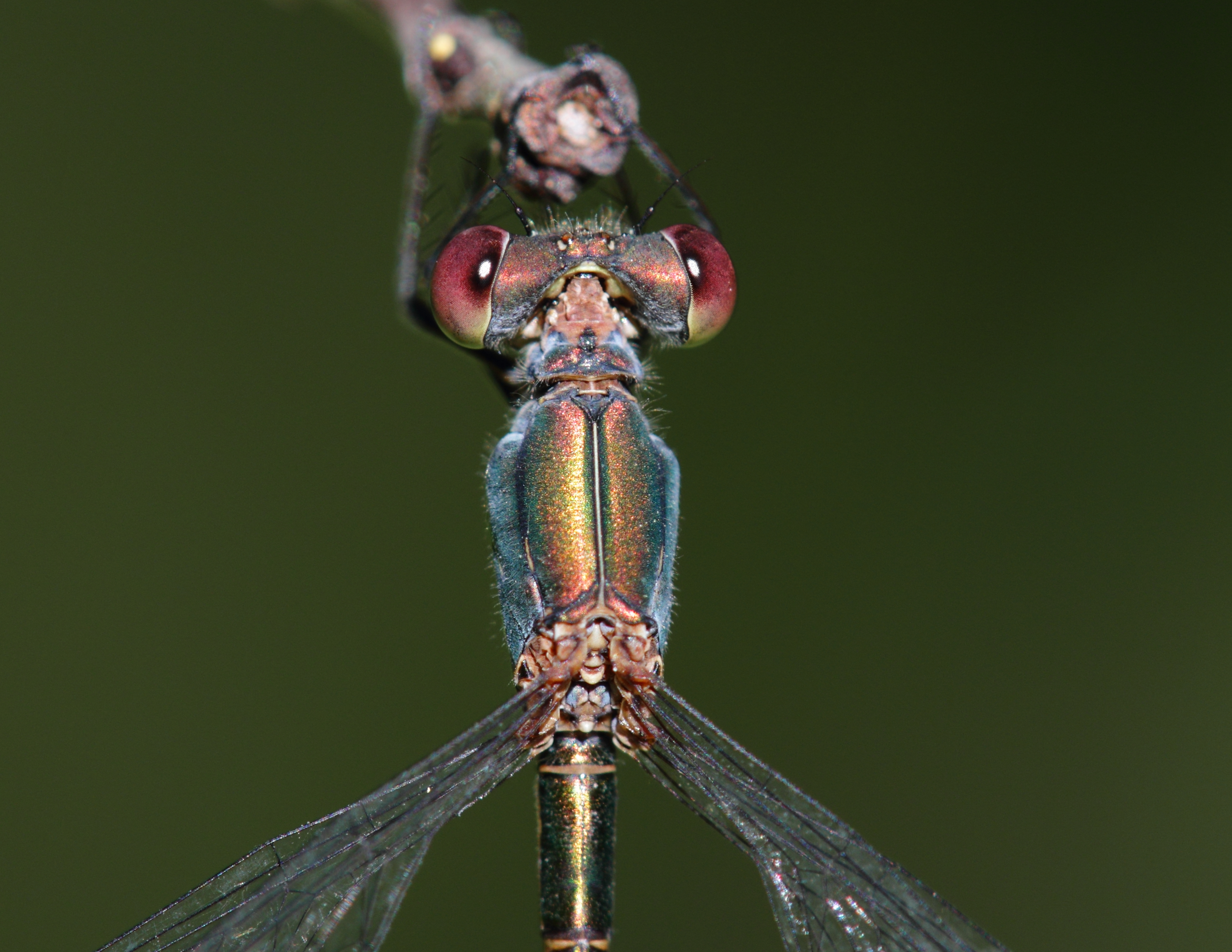 Eine Weidenjungfer im Schlosspark Schönbrunn.